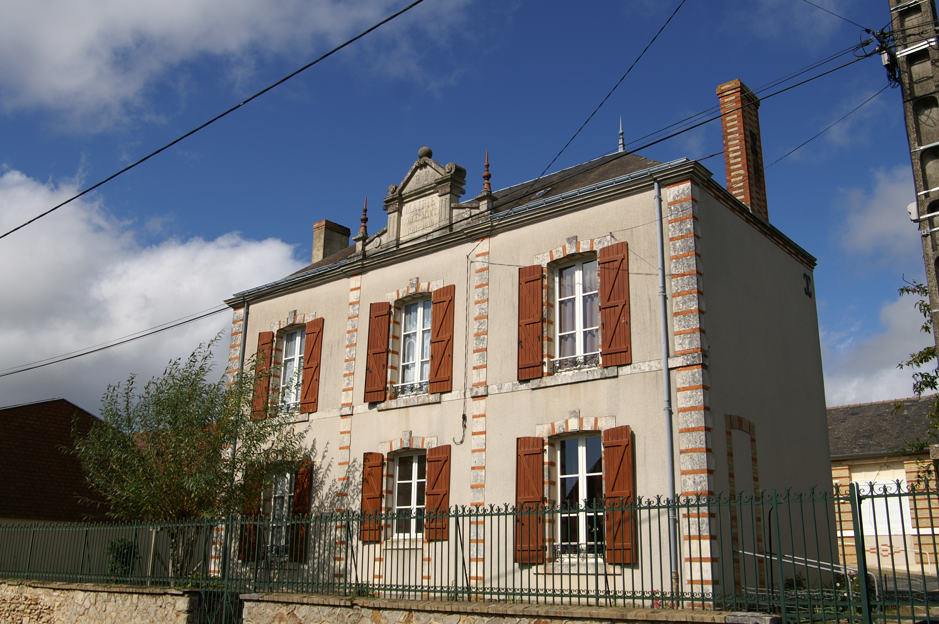 Mairie de Briosne-lès-Sables.